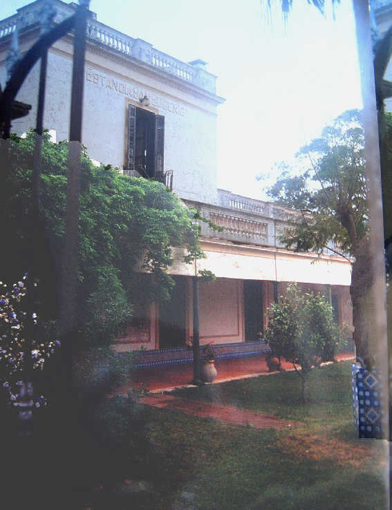 Estancia San Eugenio, Casupá/Florida, Uruguay